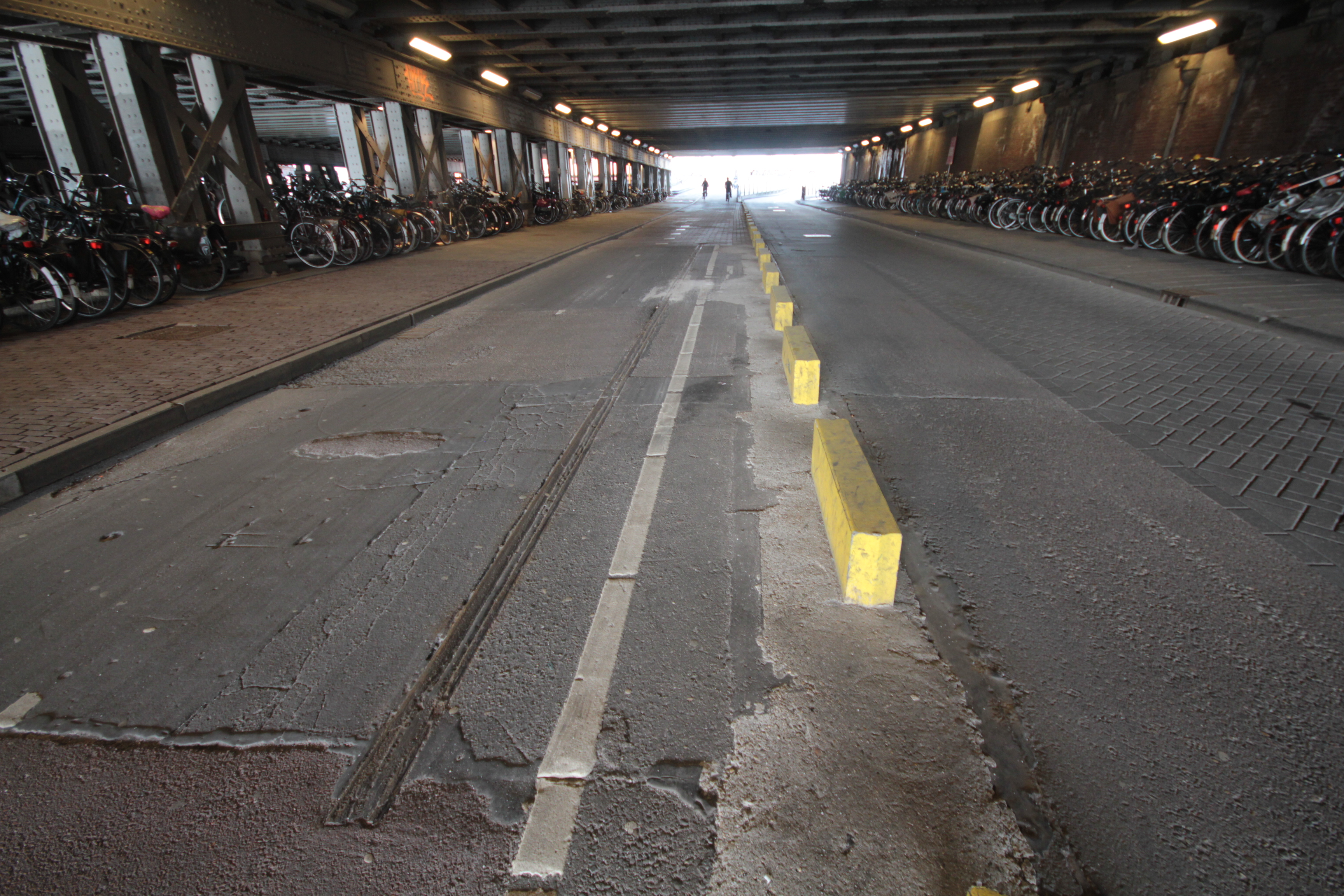 Een overgebleven spoor van de voormalige tramlijn 22, onder de Westertoegangsbrug bij het Centraal Station te Amsterdam